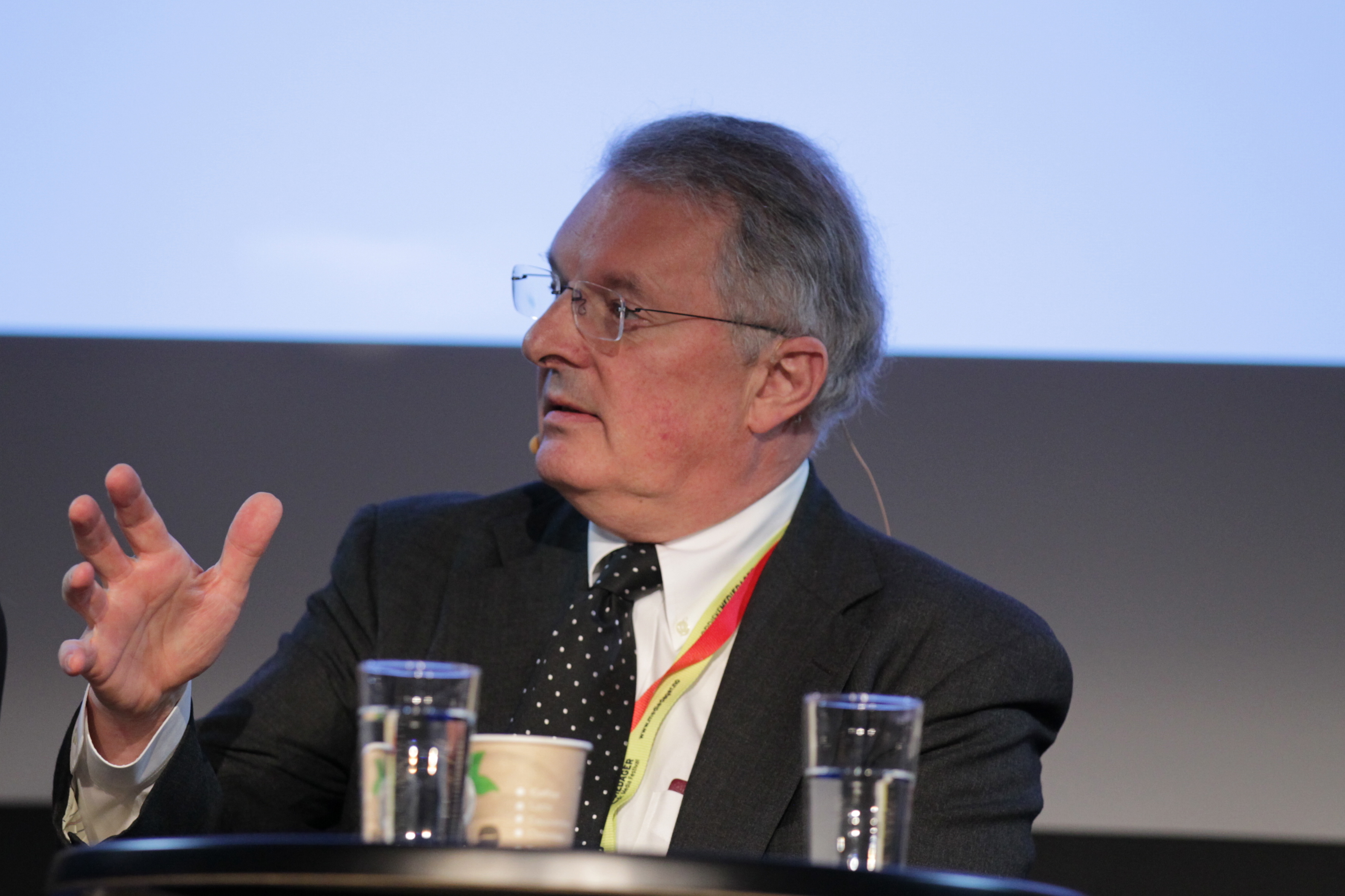 Nordiske Mediedager 2013